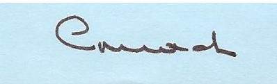 Signature de l'écrivain belge Conrad Detrez (1978)